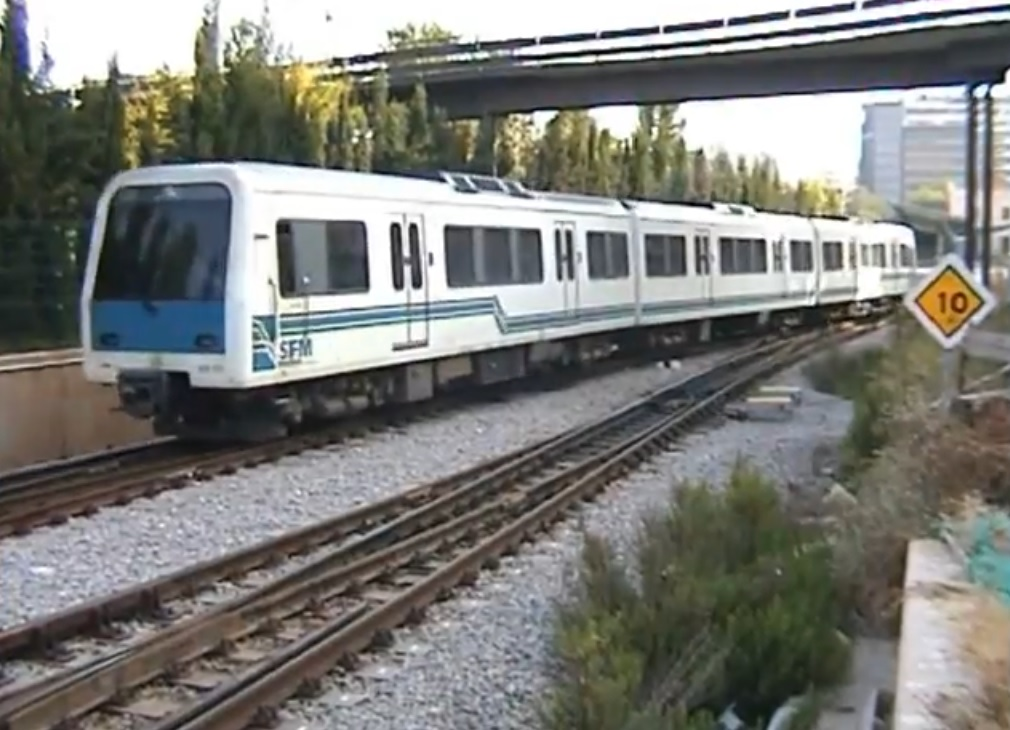 Primera remesa de la serie 61 de SFM, con los colores de la compáñía